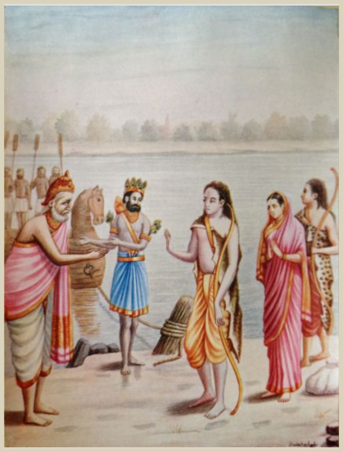 Chitra Ramayana (Illustrated Ramayana) is a simplified story of the great Indian epic in Kannada. The type is bold and beautiful. The thick pages have become brittle and need careful handling. Printed by B. Miller, Superintendent, British India, Press, Mazgaon, Bombay. It was published by, Shrimat Balasaheb Pandit Pant Pratinidhi, chief of Aundh, at Aundh, Satara district. The Kannada version is by Ramachandra Madhwa Mahishi The date shown is 1916. It is all the more important because the book contains illustrations painted by the publisher also called Bhavan Rao Shrinivas Rao, the ruler of the state of Aundh himself.